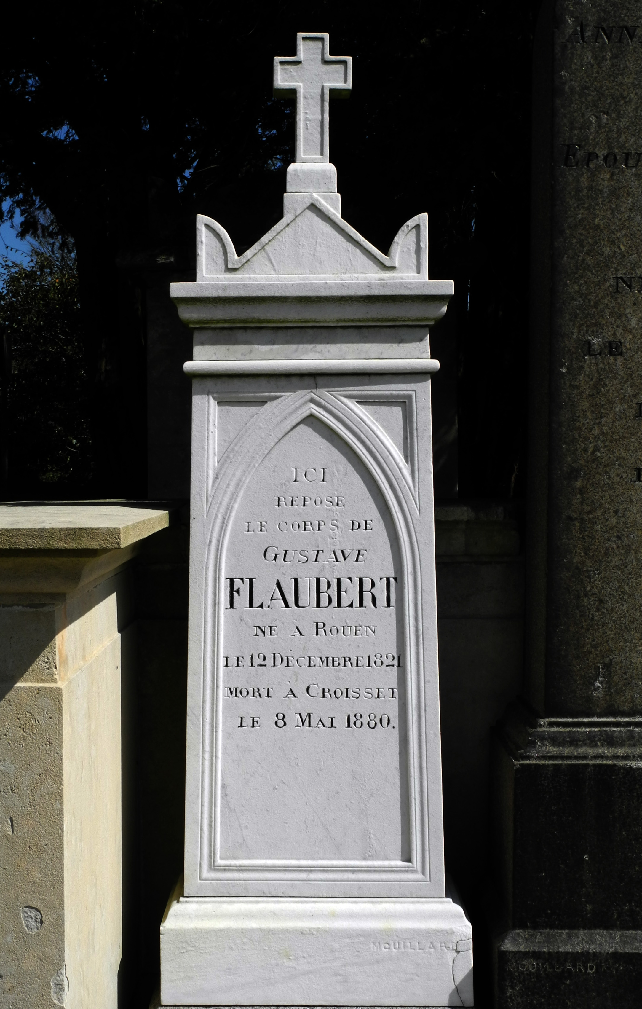 Cimitero monumentale di Rouen. Tomba di Gustave Flaubert.